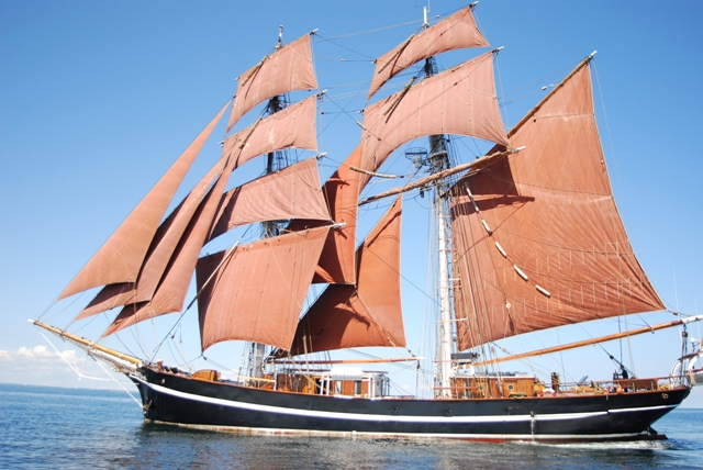 Brigantine "Eye of the Wind", Steuerbord-Ansicht